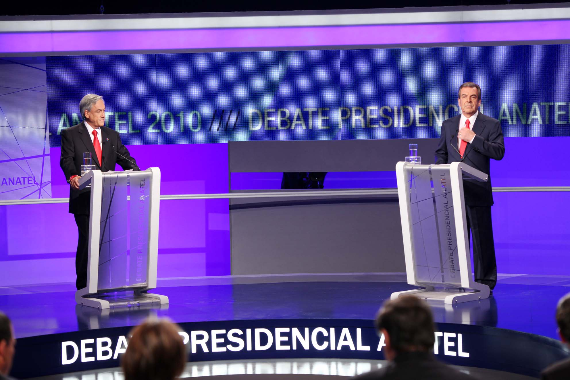 El lunes 11 de enero de 2010 se llevó a cabo el último debate presidencial con la presencia de Eduardo Frei y Sebastián Piñera.